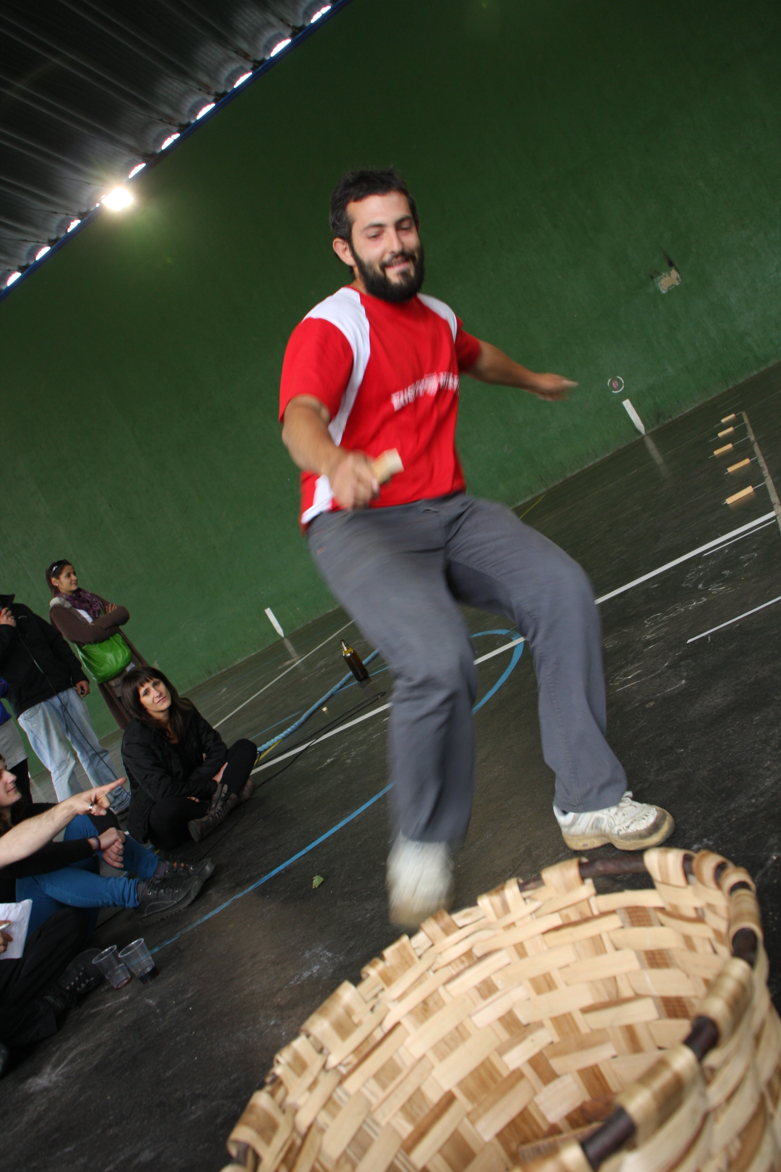 Lokotx biltzea.